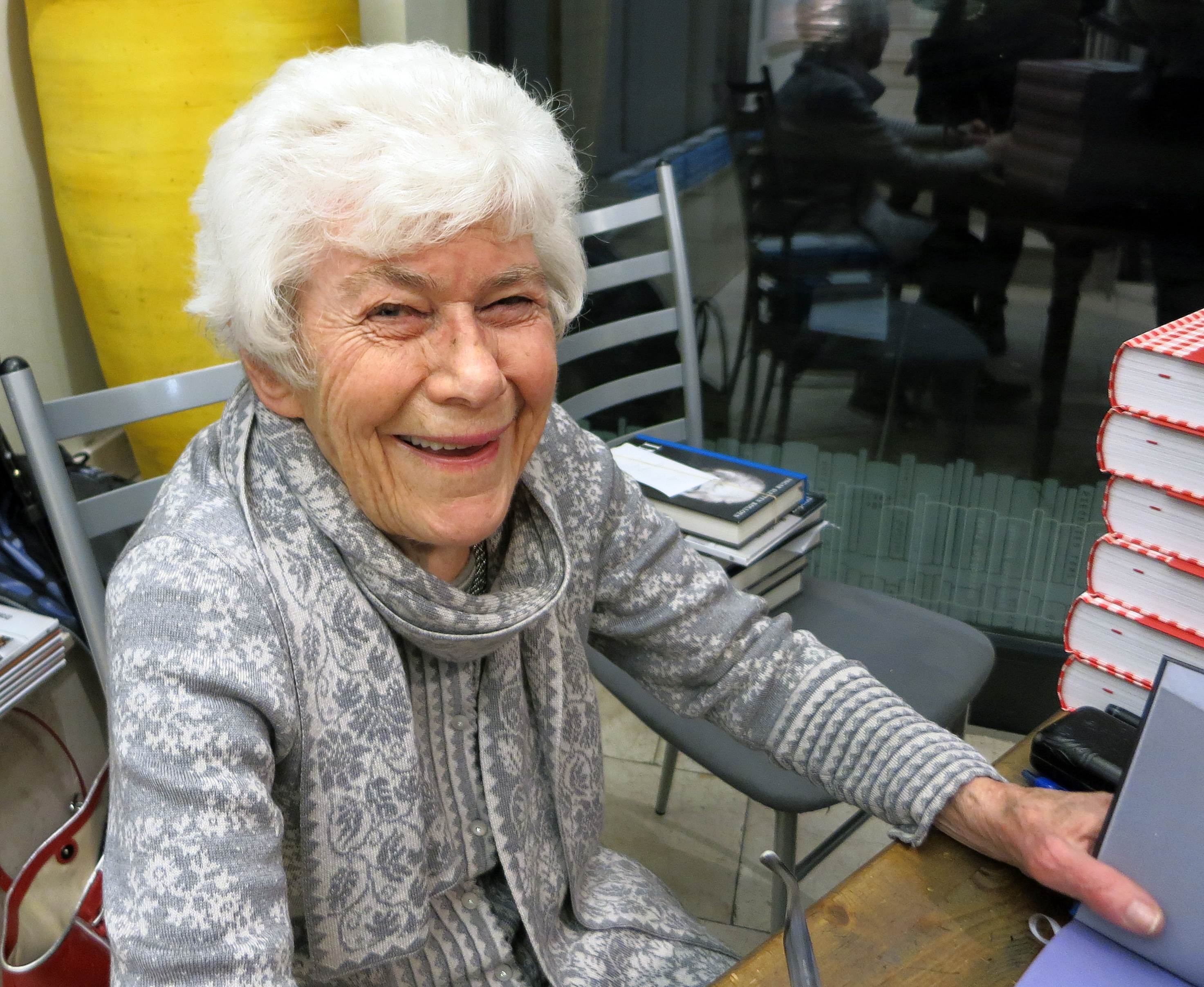 Ingrid Espelid Hovig under boksignering i 2013.